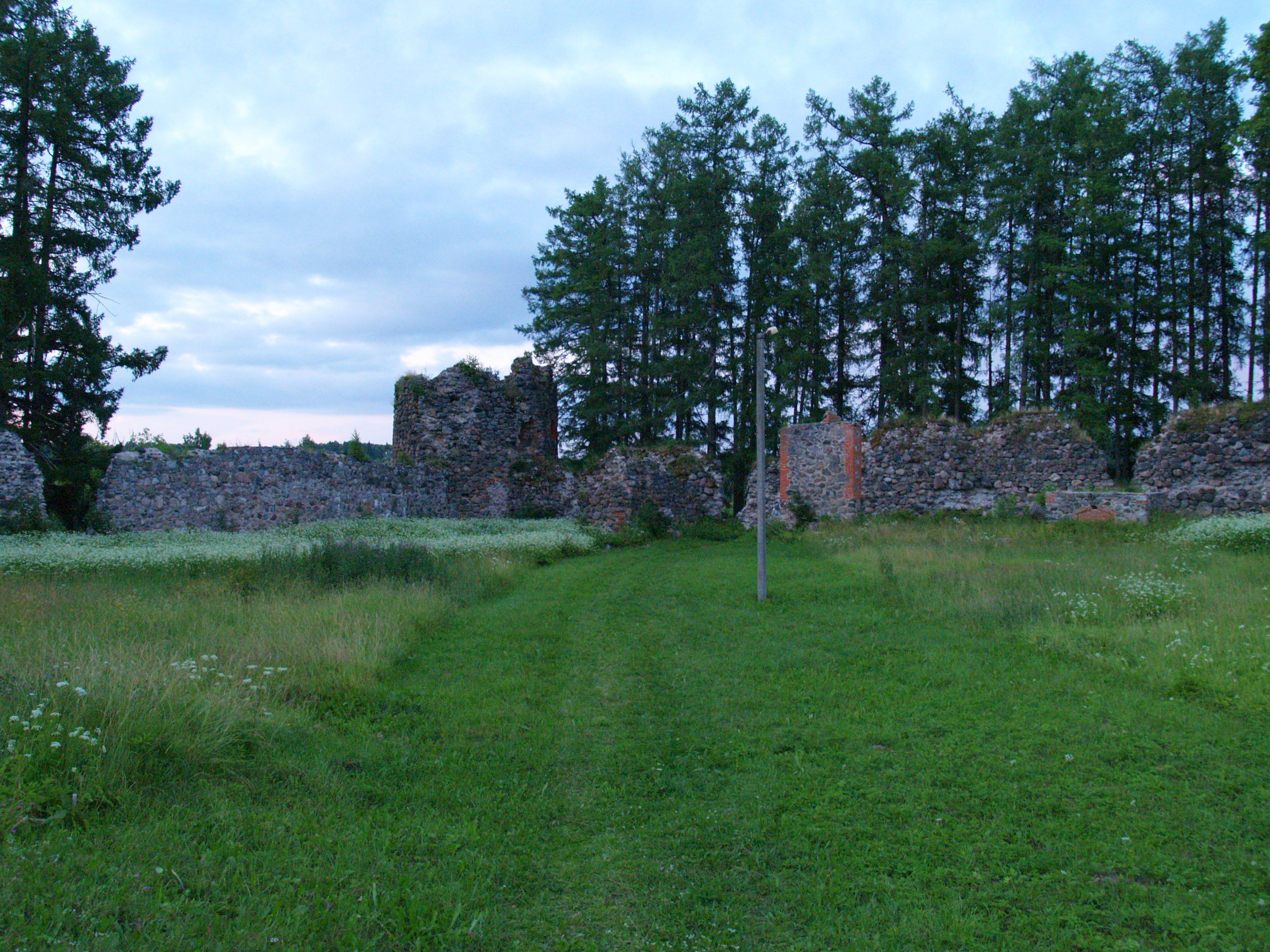 Härgmäe ordulinnuse siseõu. Kirdenurk.